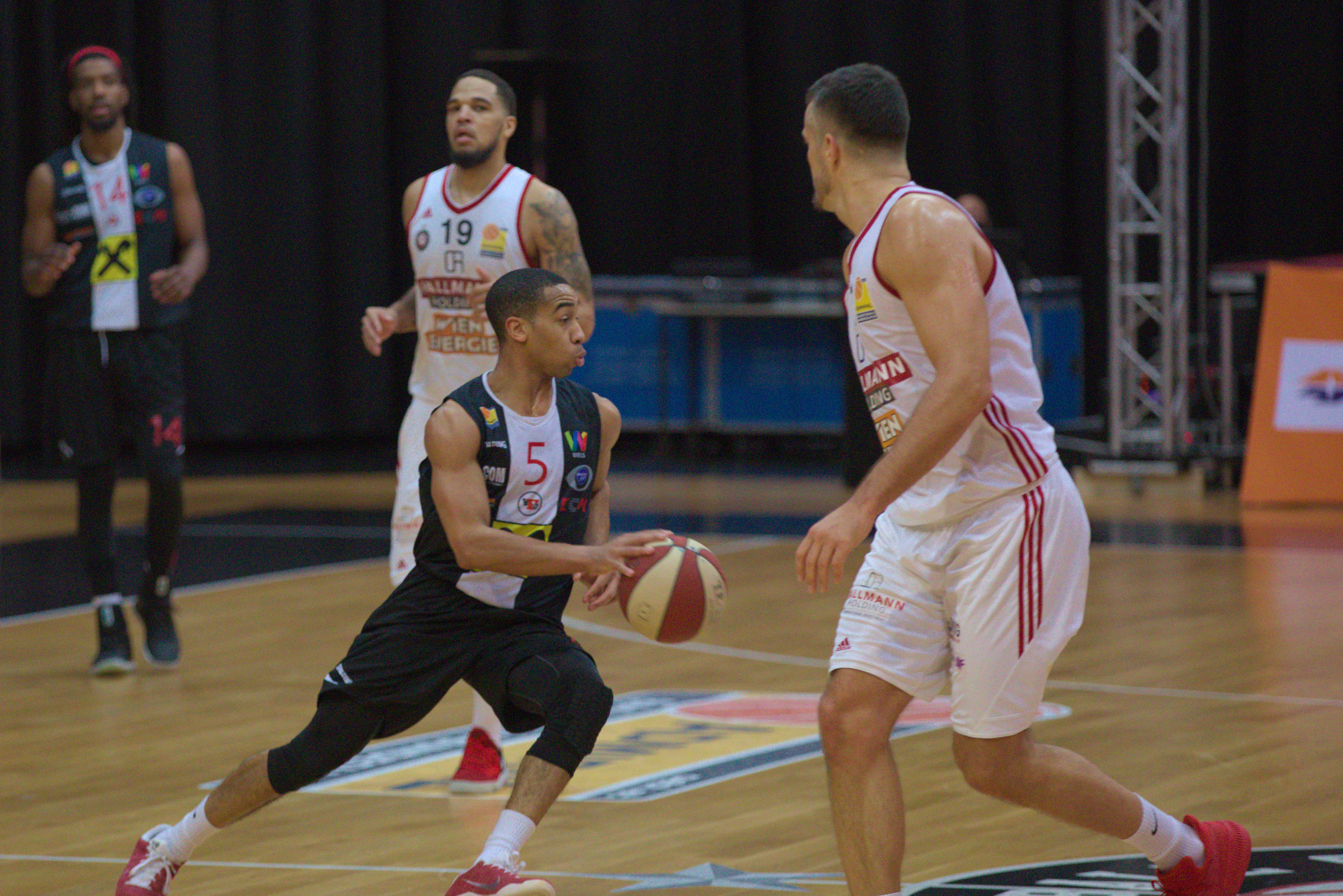 Basketball-Bundesligaspiel BC Hallmann Vienna vs. Raiffeisen Flyers Wels, 21. Jänner 2018